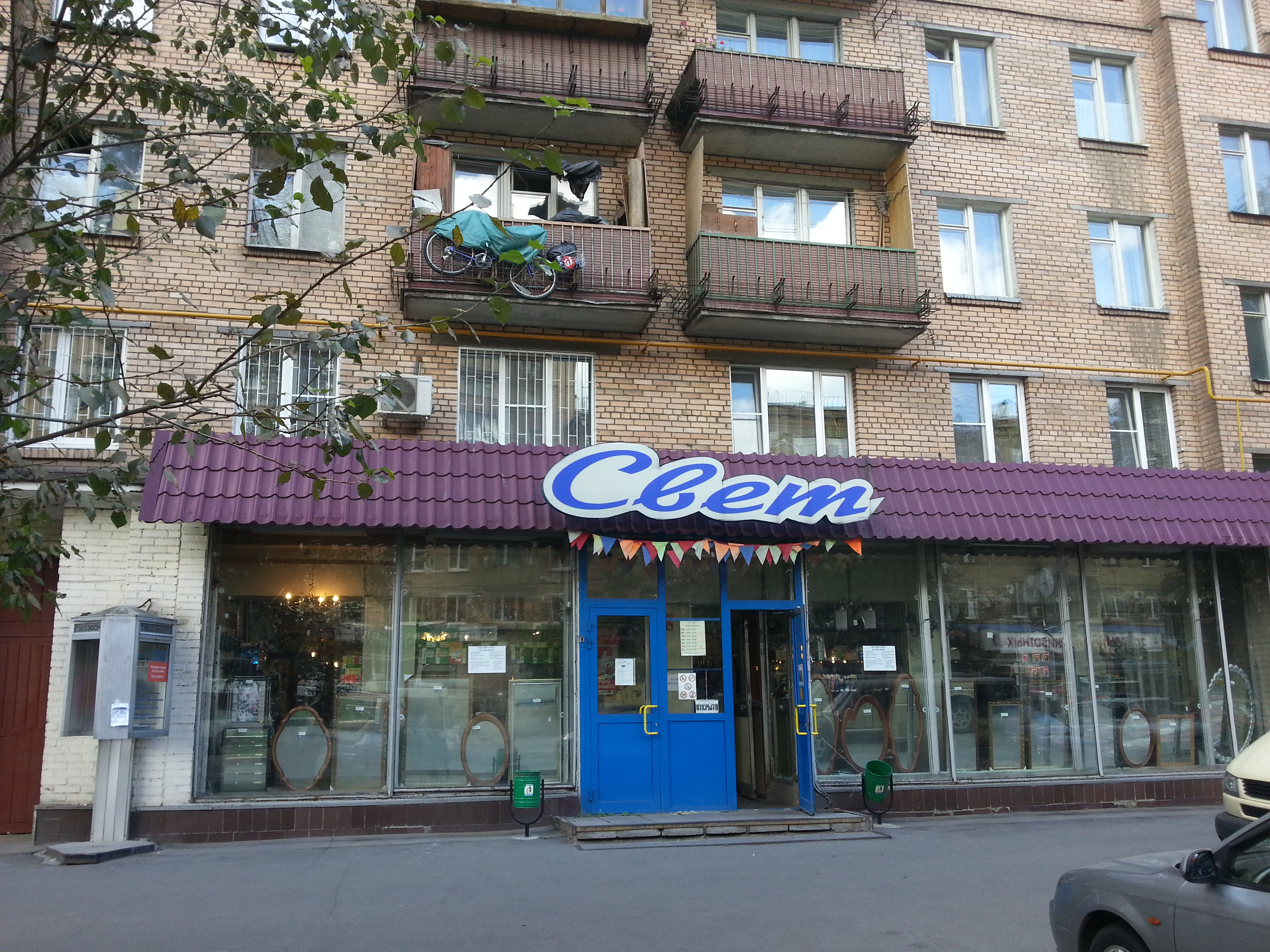 Магазин "Свет" на Первомайской улице. 5 августа 2015г.